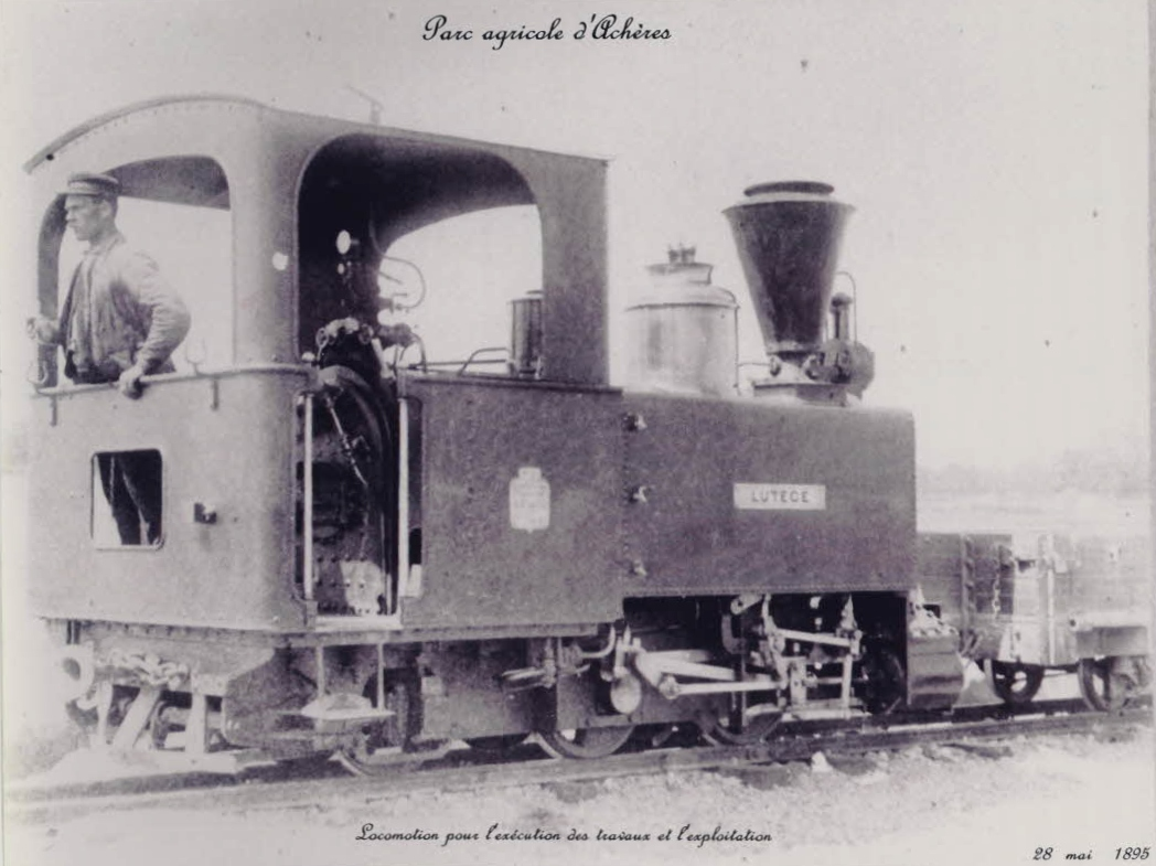 Locotracteur de la voie Decauville dans le parc agricole d'Achères